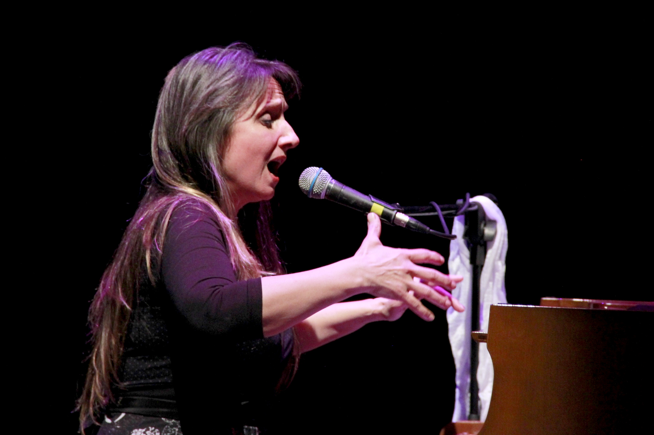 Presentación en el Auditorio de la Memoria Haroldo Conti (ex Esma)